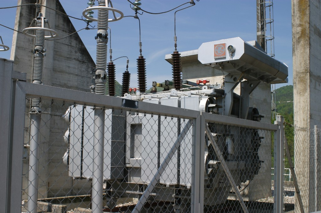 Transformer Photo Andrejj